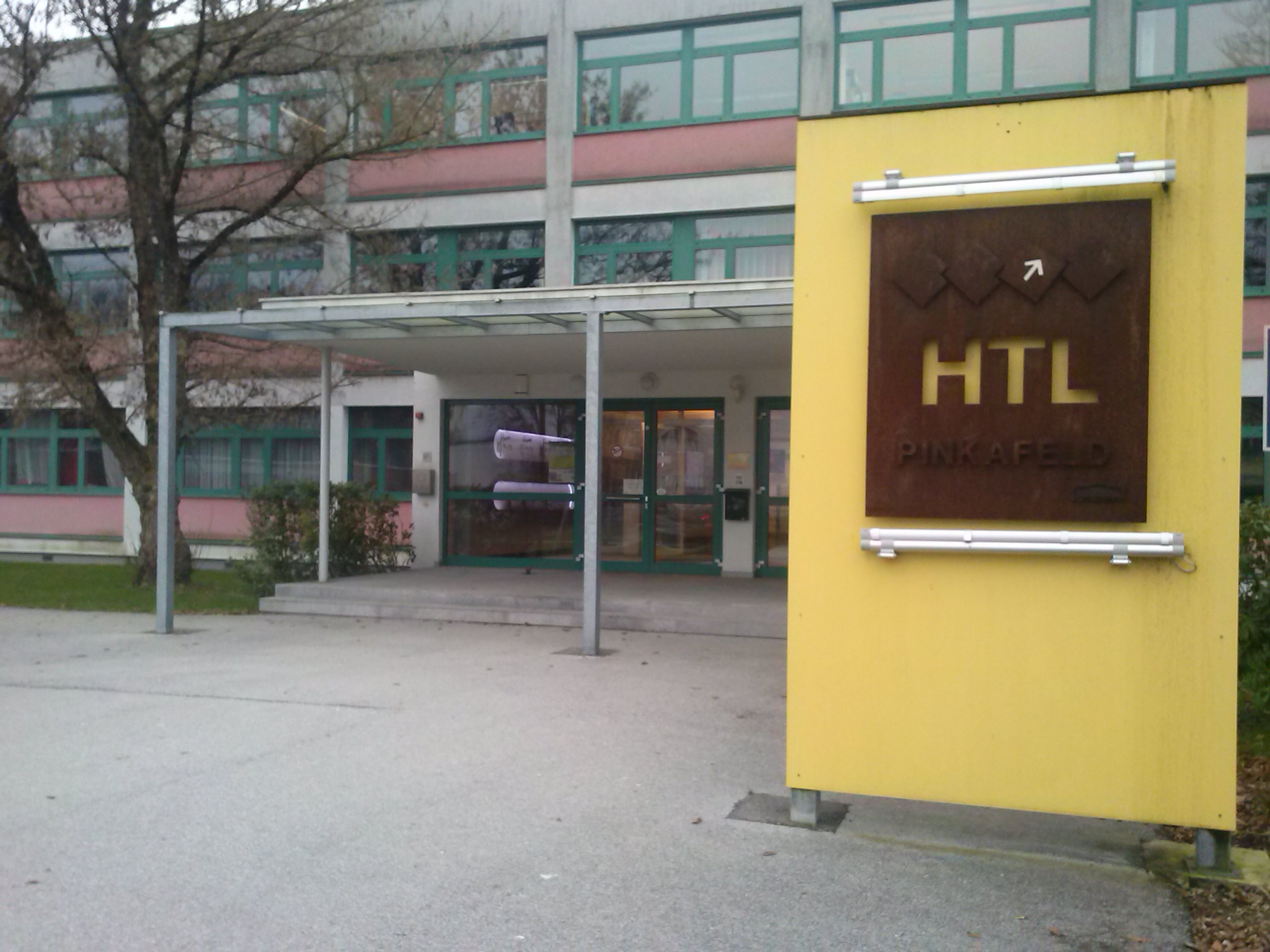 Eingangsbereich der HTBL